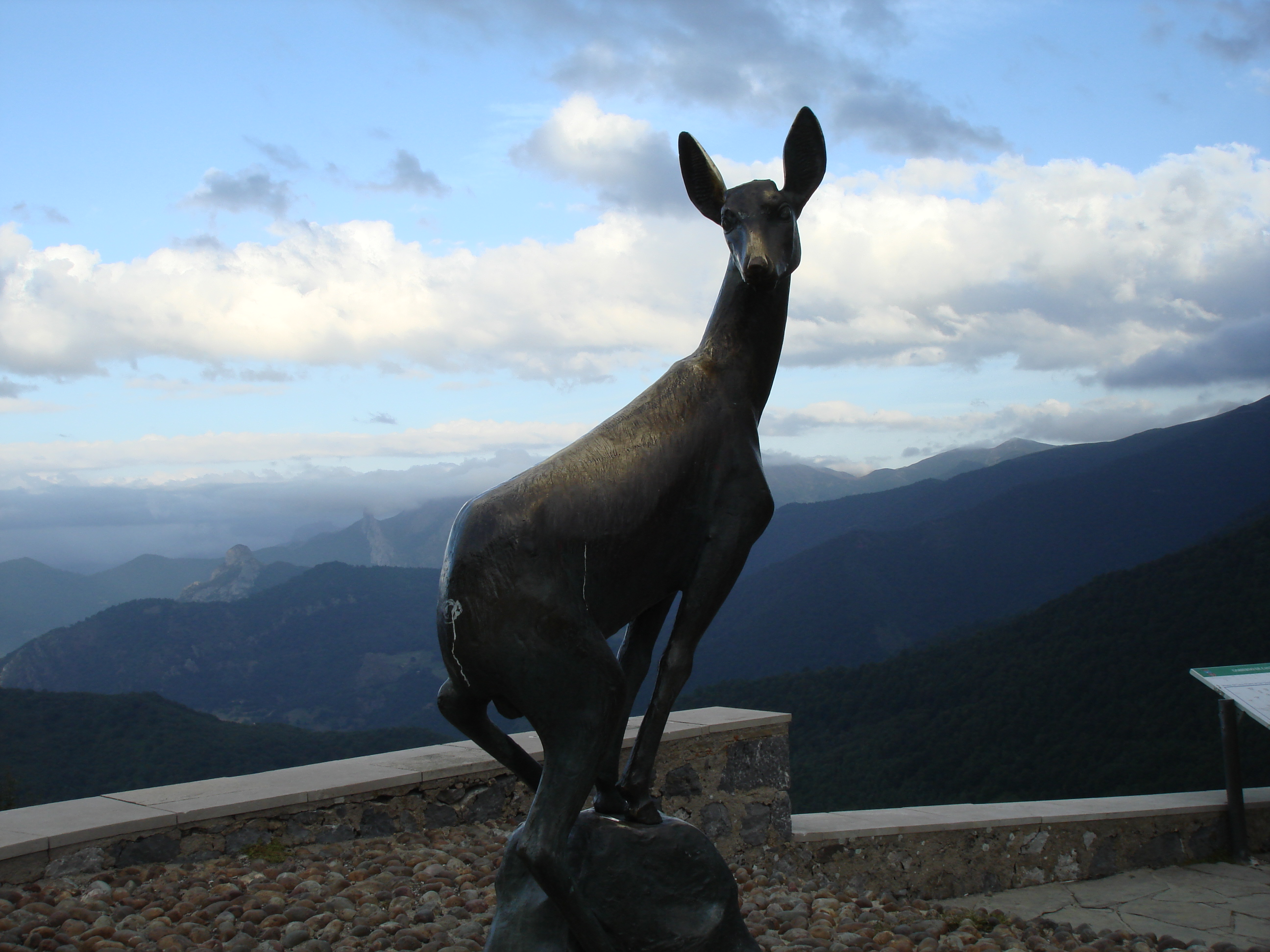 El Monumento al Corzo en el mirador del puerto de San Glorio (León-Cantabria), España.